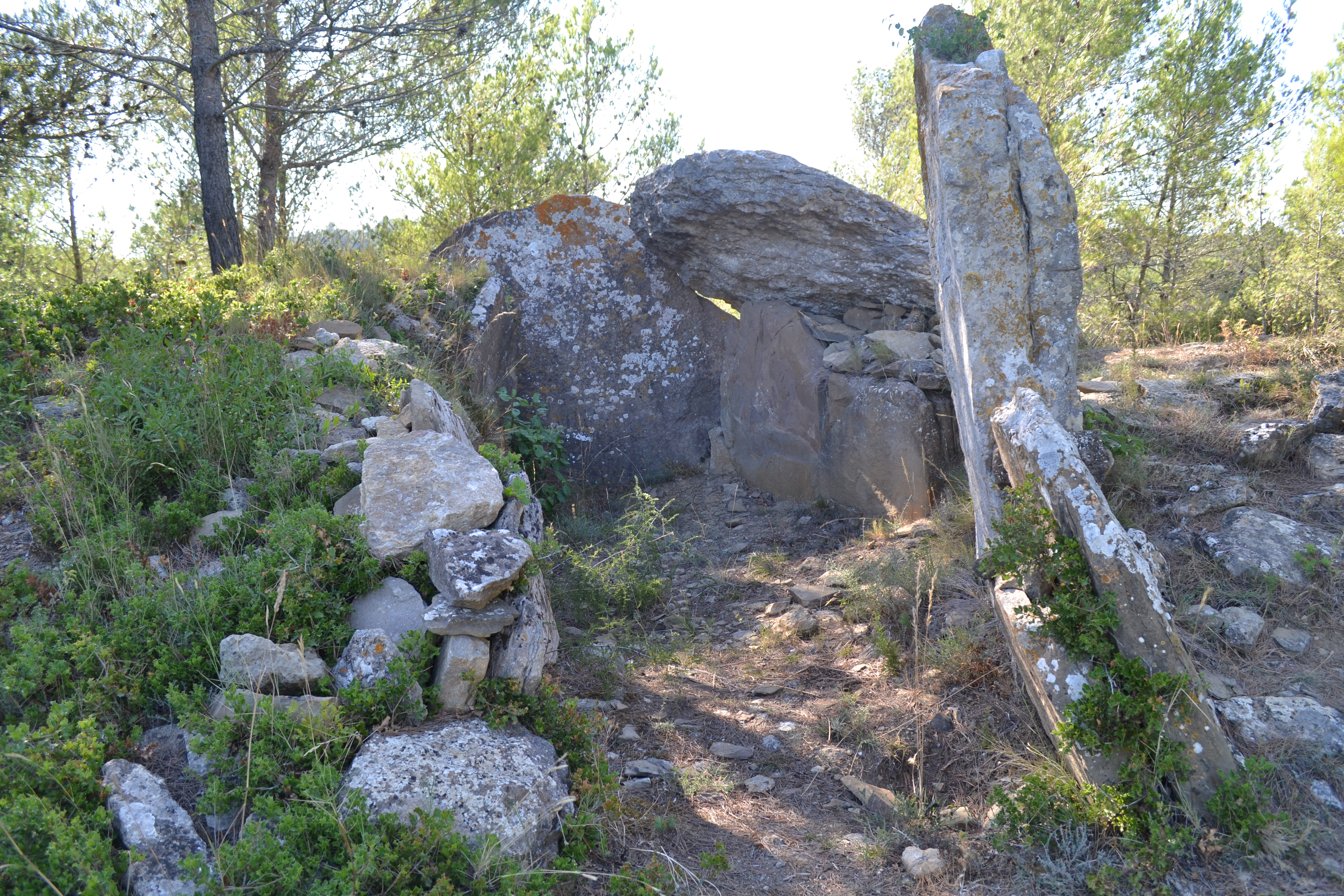 Dolmen de la Madeleine d'Albesse à Monze (11).